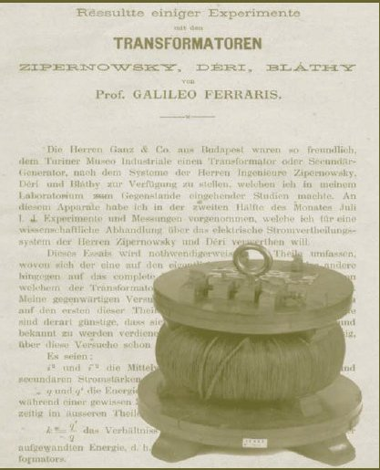 Galileo Ferraris szakvéleménye a bevizsgált 26. számú transzformátorról.